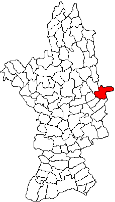 Categorie:Hărţi ale judeţului Olt